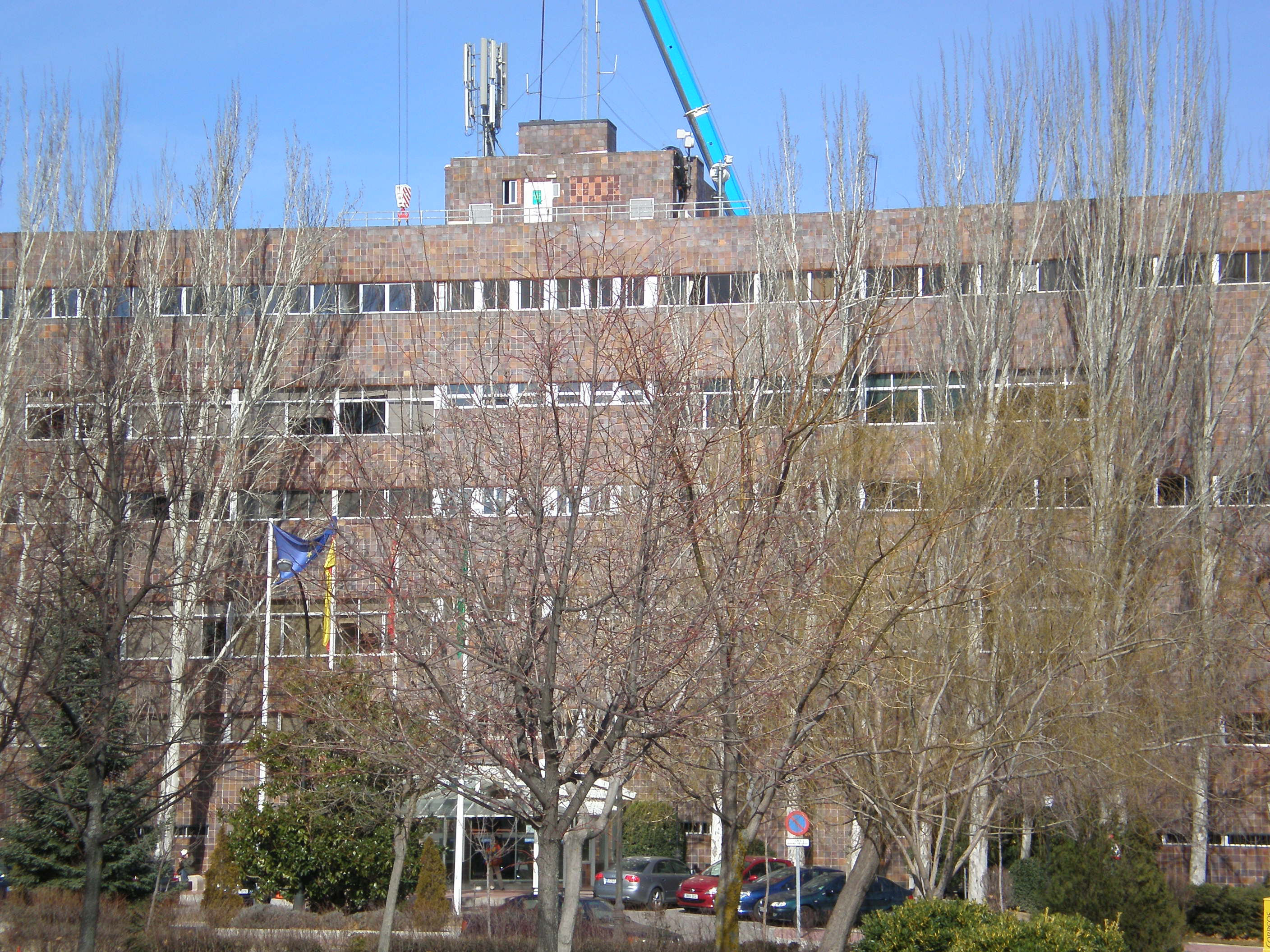 Rectorado de la UAM Madrid /UAM Madrid Rectorate Building